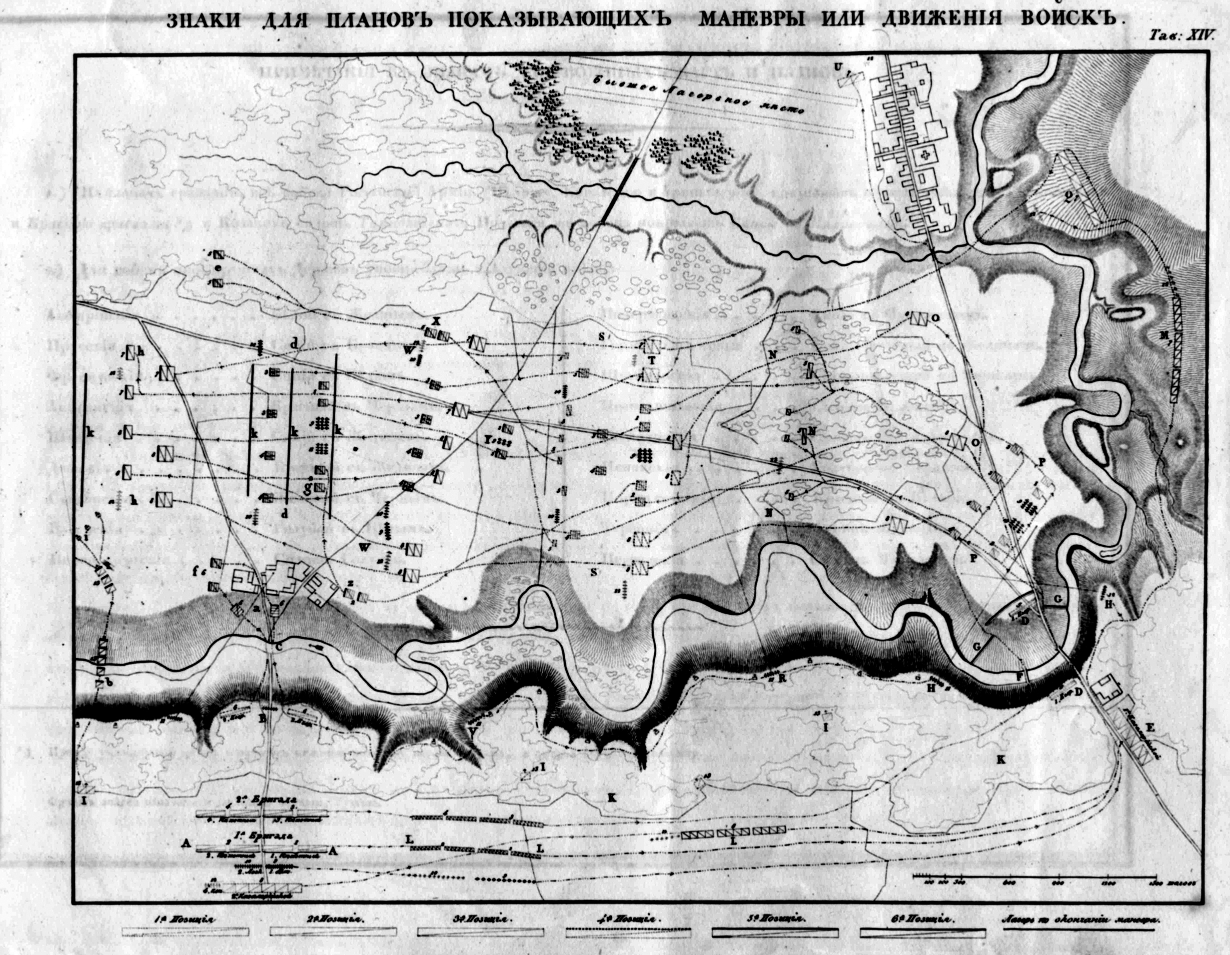 Условные знаки 1822 года. Утверждёны начальником Главного штаба в июне 1822 г., подписанны А.И. Хатовым и К.Ф. Толем.